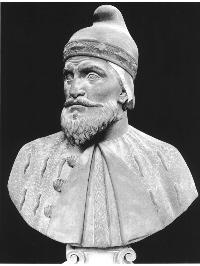 Busto di Andrea Contarini. Il busto fa parte del Panteon Veneto, conservato presso Palazzo Loredan di Campo Santo Stefano a Venezia.